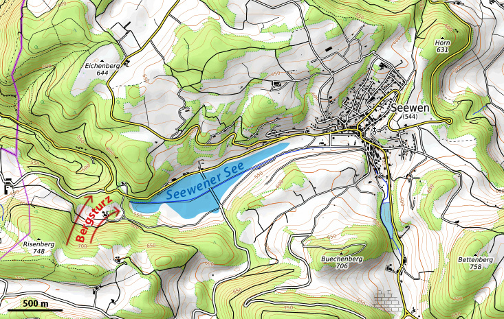 Karte der ungefähren Ausdehnung des Seewener Sees